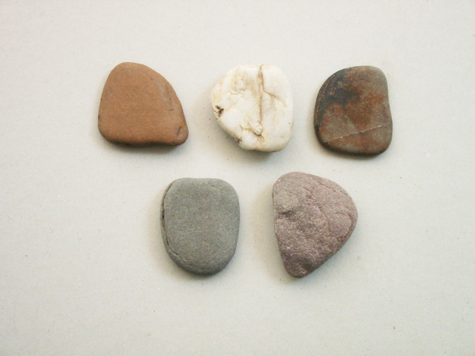 5 verschiedene Flusskieselsteine vom Untermosel-Flussufer